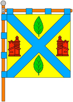 Berezne h